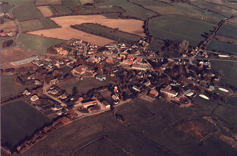 Luftbild des Dorfes Haby